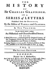 Обкладинка книги «Історія сера Чарлза Ґрандісона»